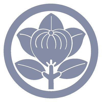 丸に橘(まるにたちばな）日本の家紋「橘紋」のひとつ。